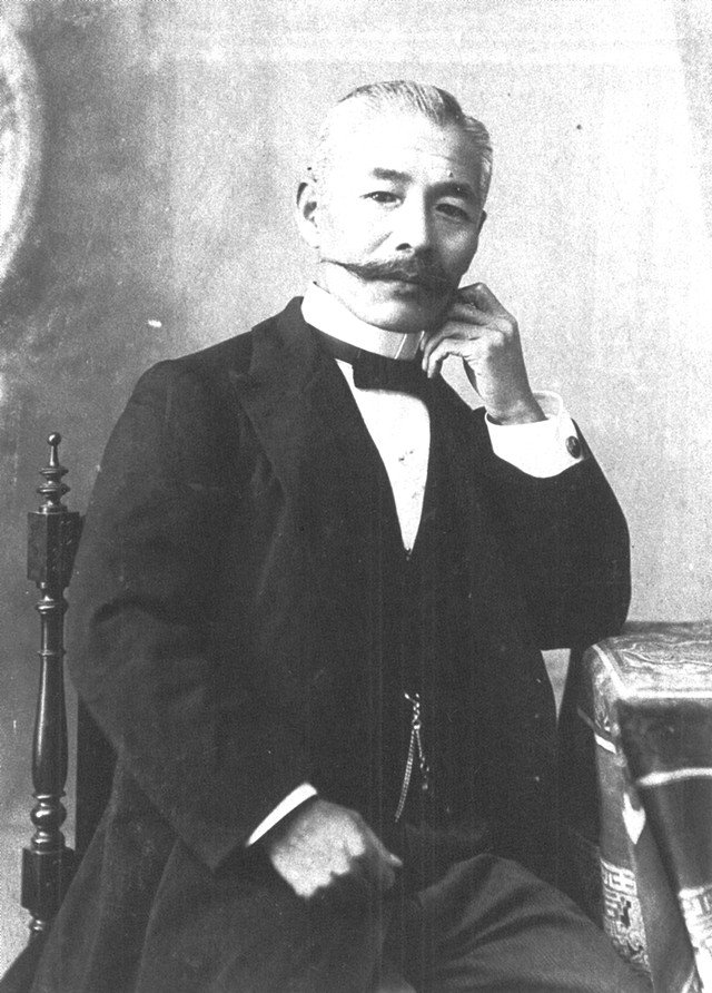 山本讃七郎